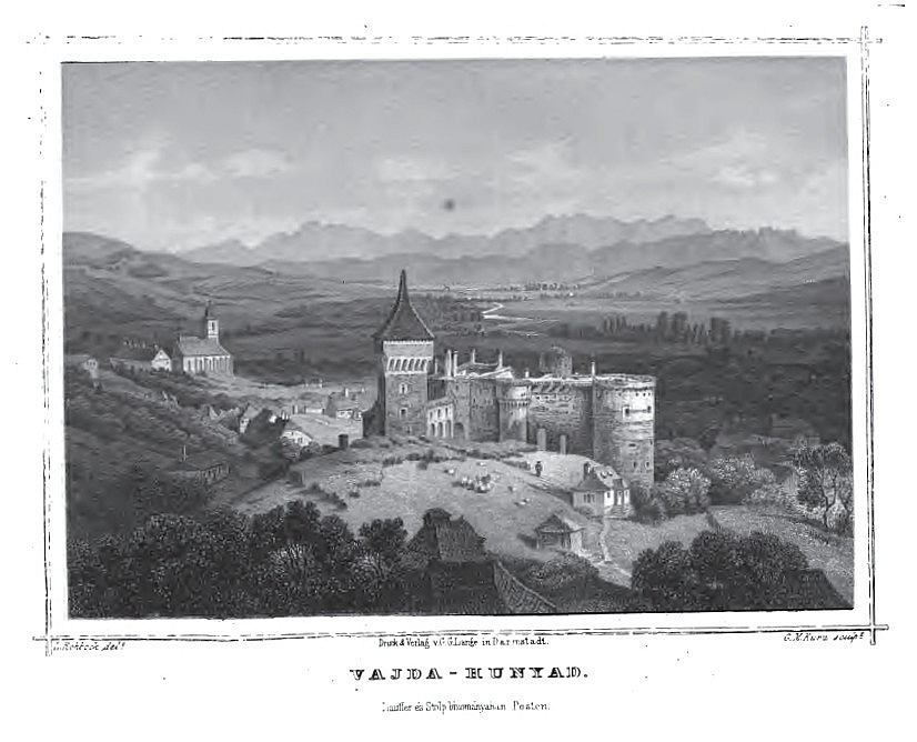 Burg Vajad Hunyad (Rumänien-Siebenbürgen), Stahlstich